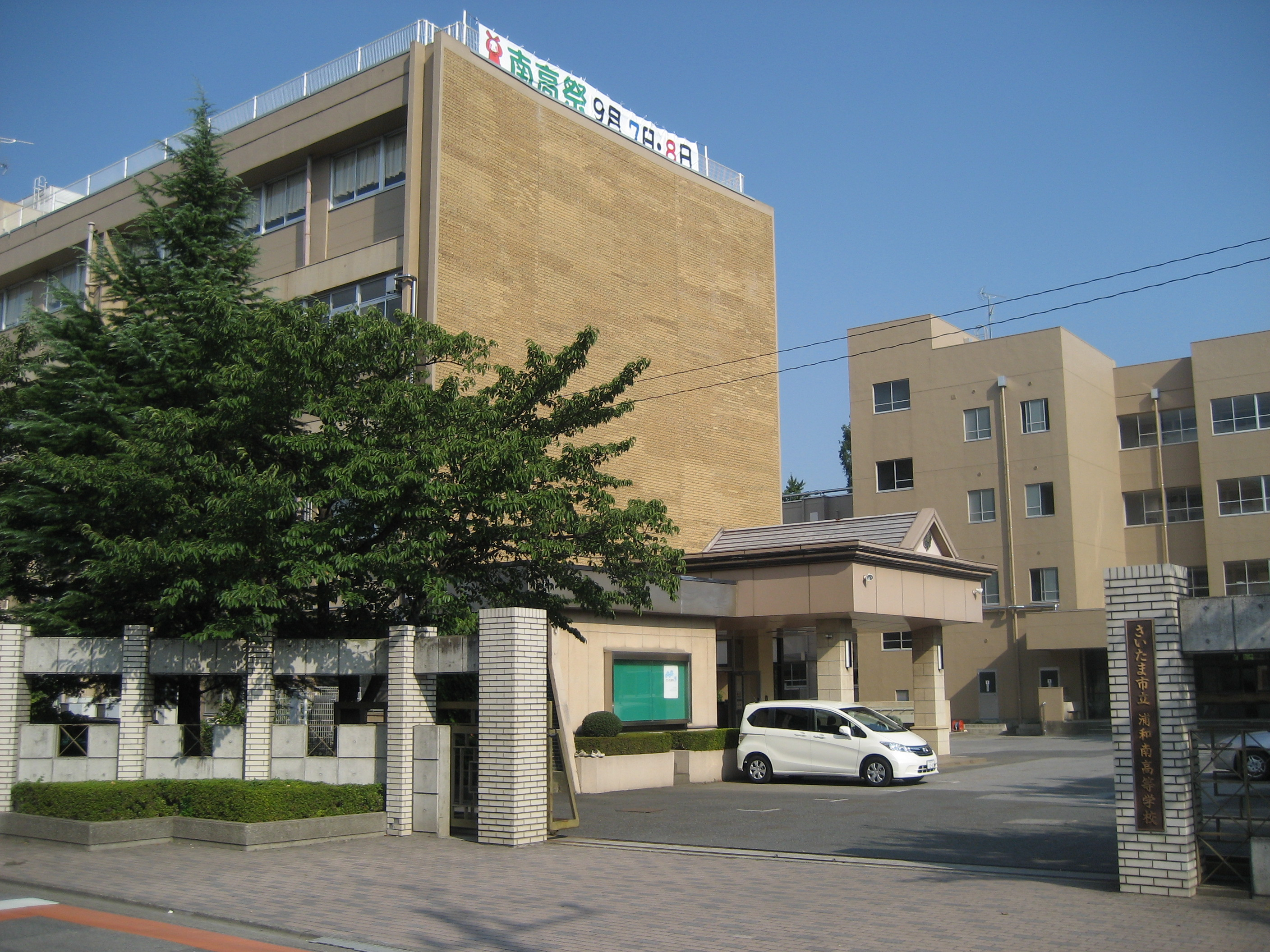 さいたま市立浦和南高等学校（正門付近を撮影）